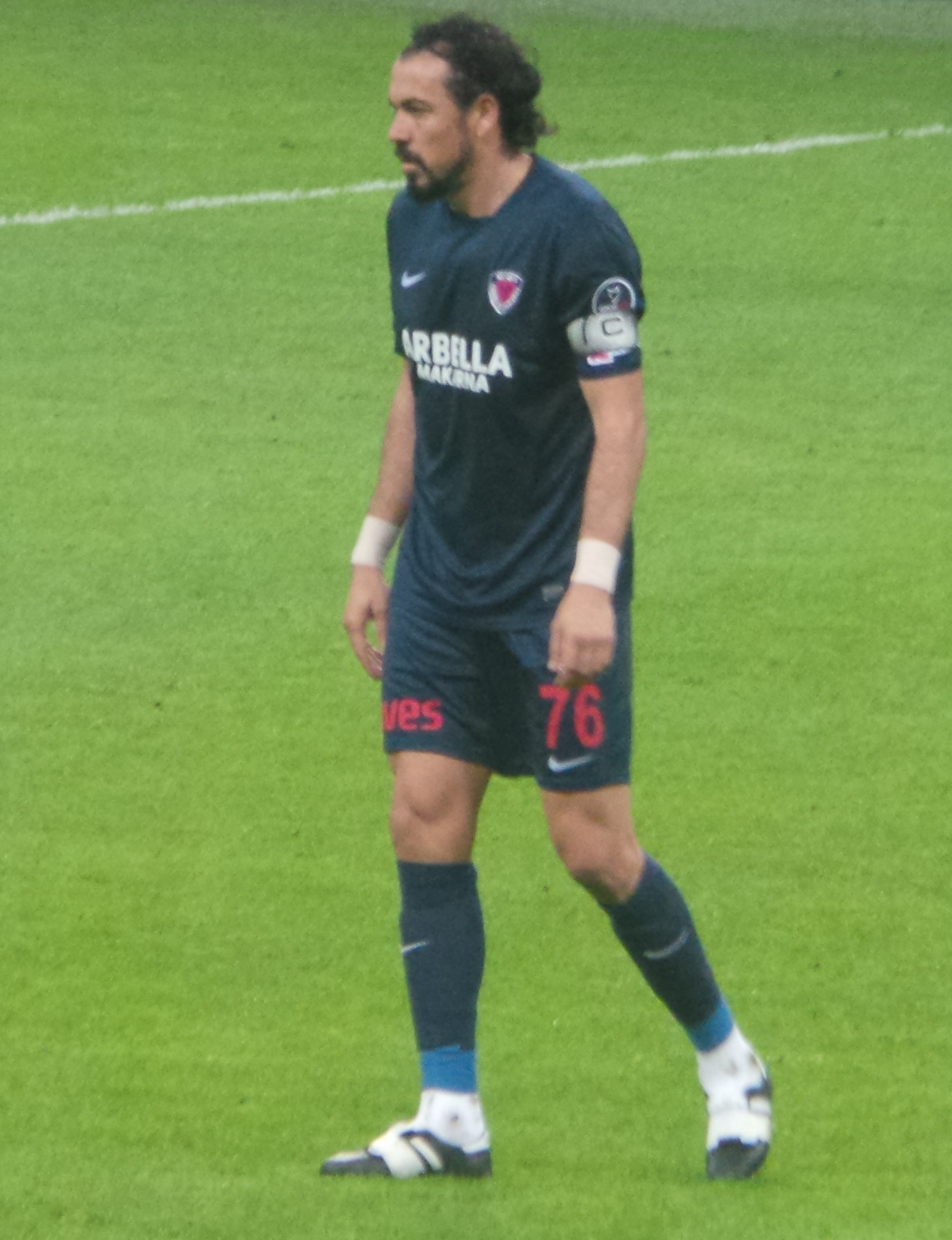 Servet Çetin Mersin İY